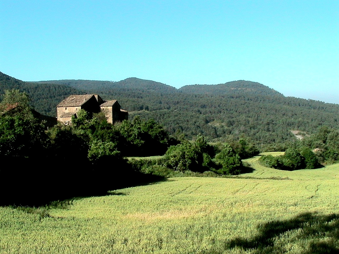 Masia Vilella (Navès) amb les muntanyes de Travil al fons This is a a photo of a natural area in Catalonia, Spain, with id: ES510187